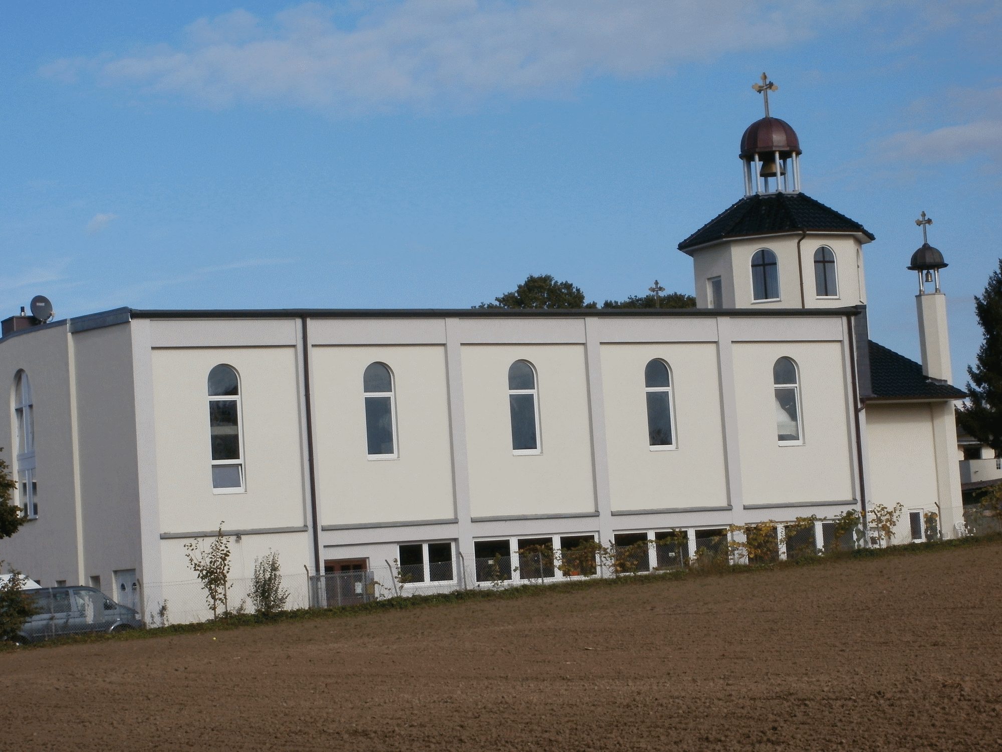 Bild der Syrisch-Orthodoxen Kirche St. Maria & St. Simona in Hamburg-Langenbek.